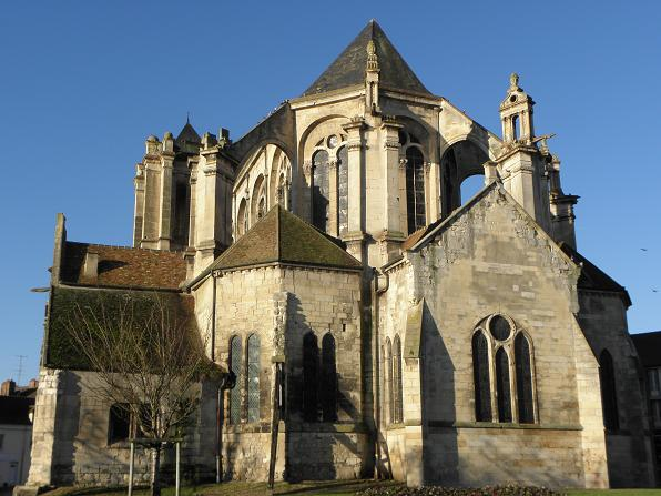 Chevet de la collégiale Notre-Dame-et-Saint-Loup de Montereau-Faut-Yonne (77).